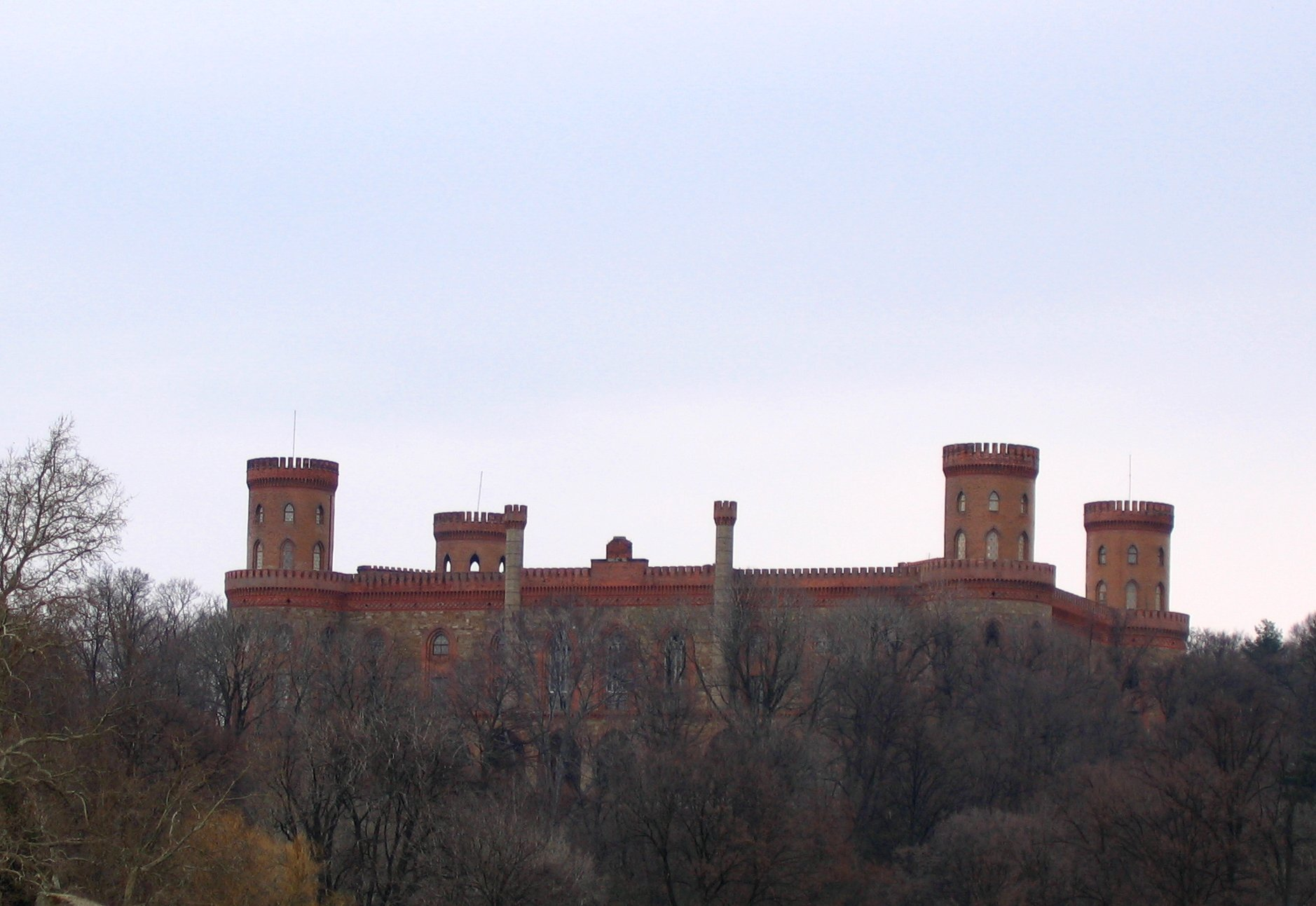 Schloss Kamenz, Polen